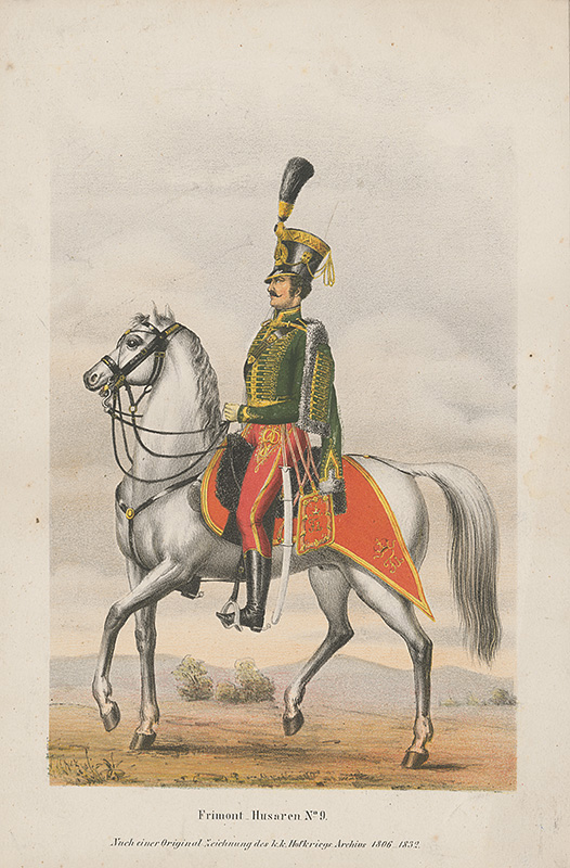 Magyar huszár litográfián